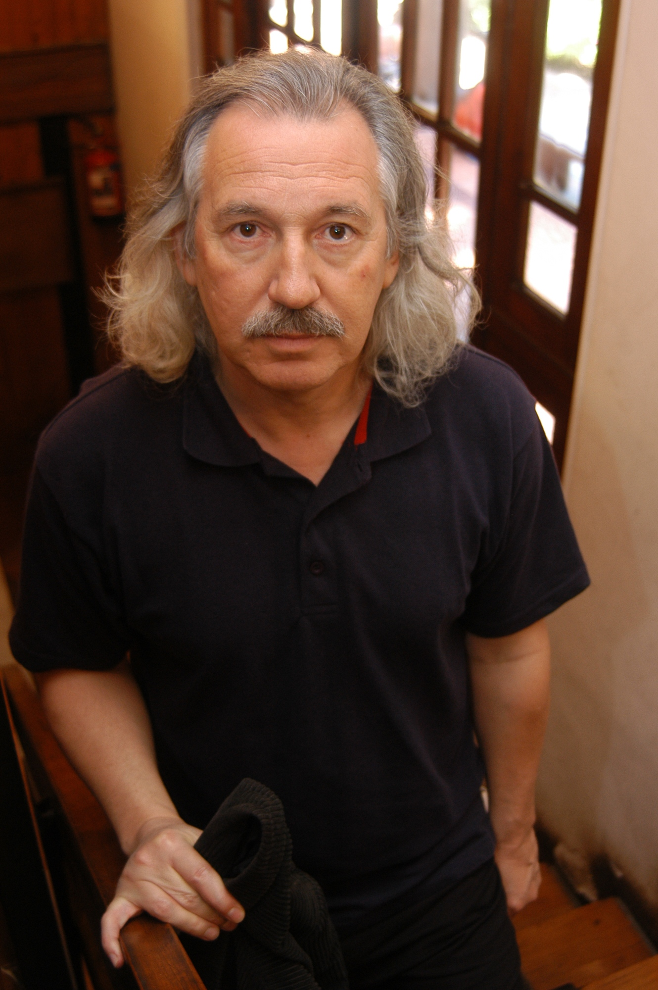 El compositor chileno Alejandro Guarello en 2010